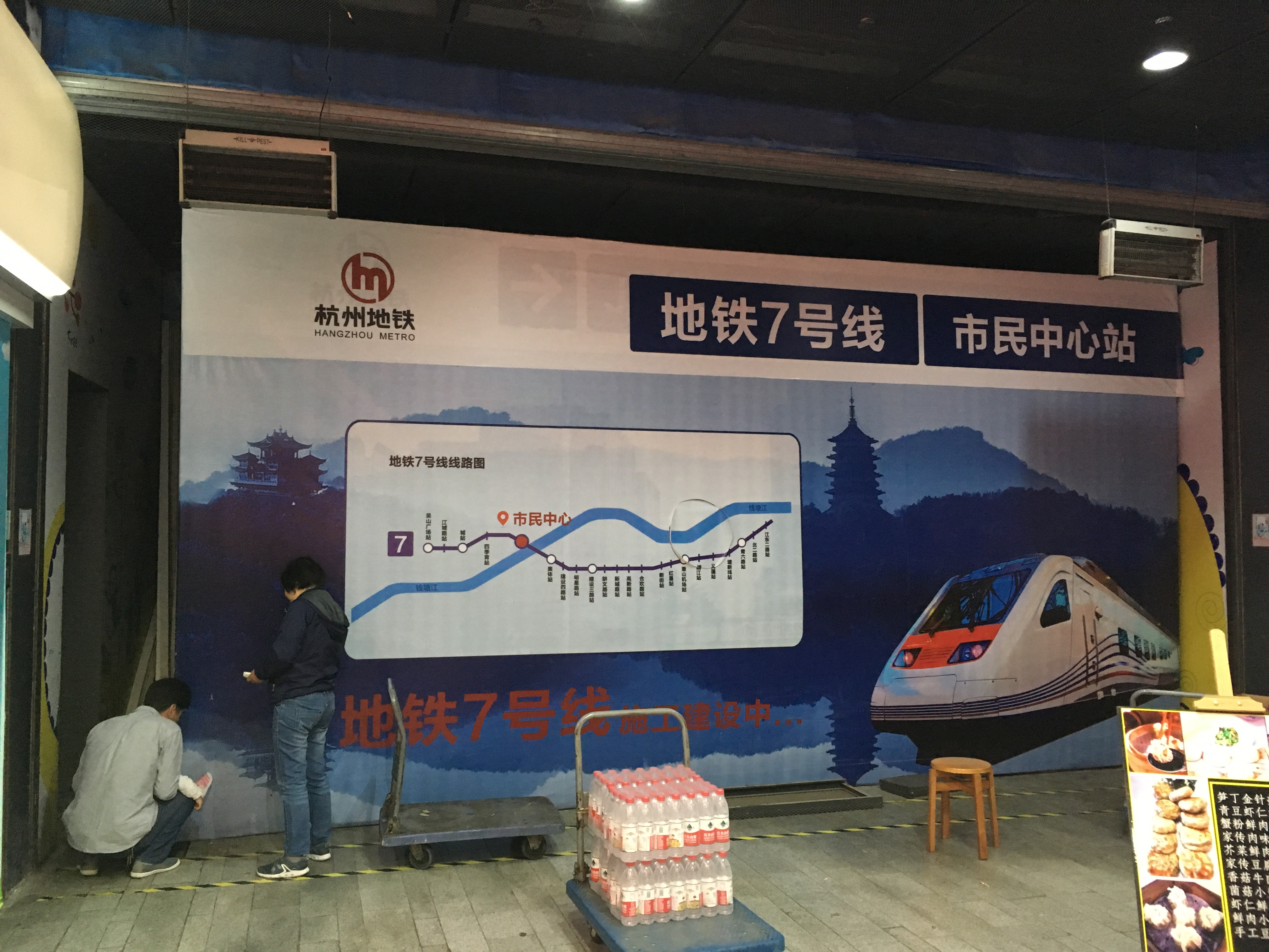 市民中心站7号线预留入口